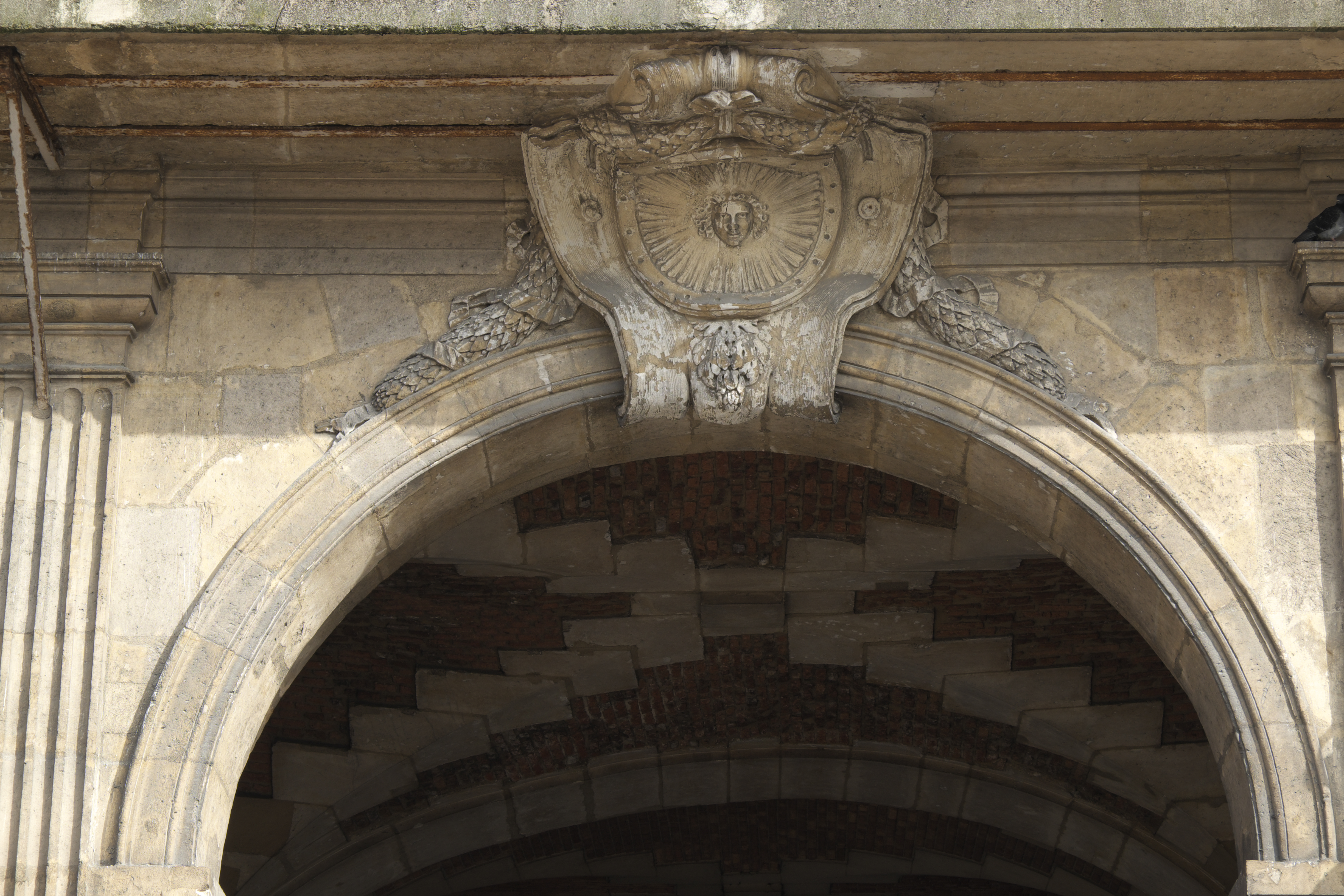 Pavillon de la Reine, 28 Place des Vosges, im 3. Arrondissement in Paris (Île-de-rance/Frankreich)